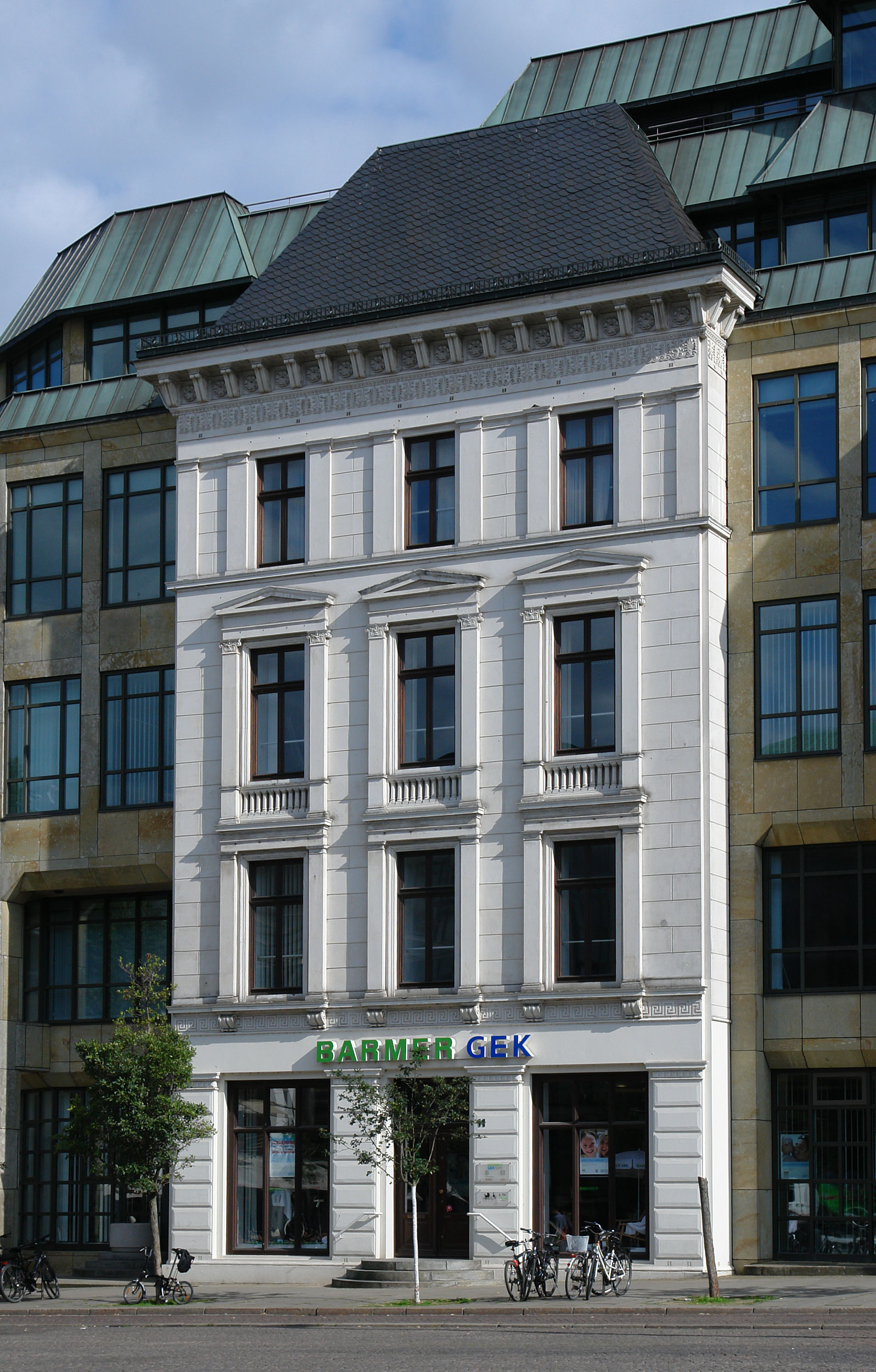 Haus Schmidt in Bremen, Domshof 11Das abgebildete Objekt ist ein geschütztes Kulturdenkmal in der Freien Hansestadt Bremen, mit der Nr. 1697 beim Landesamt für Denkmalpflege registriert.